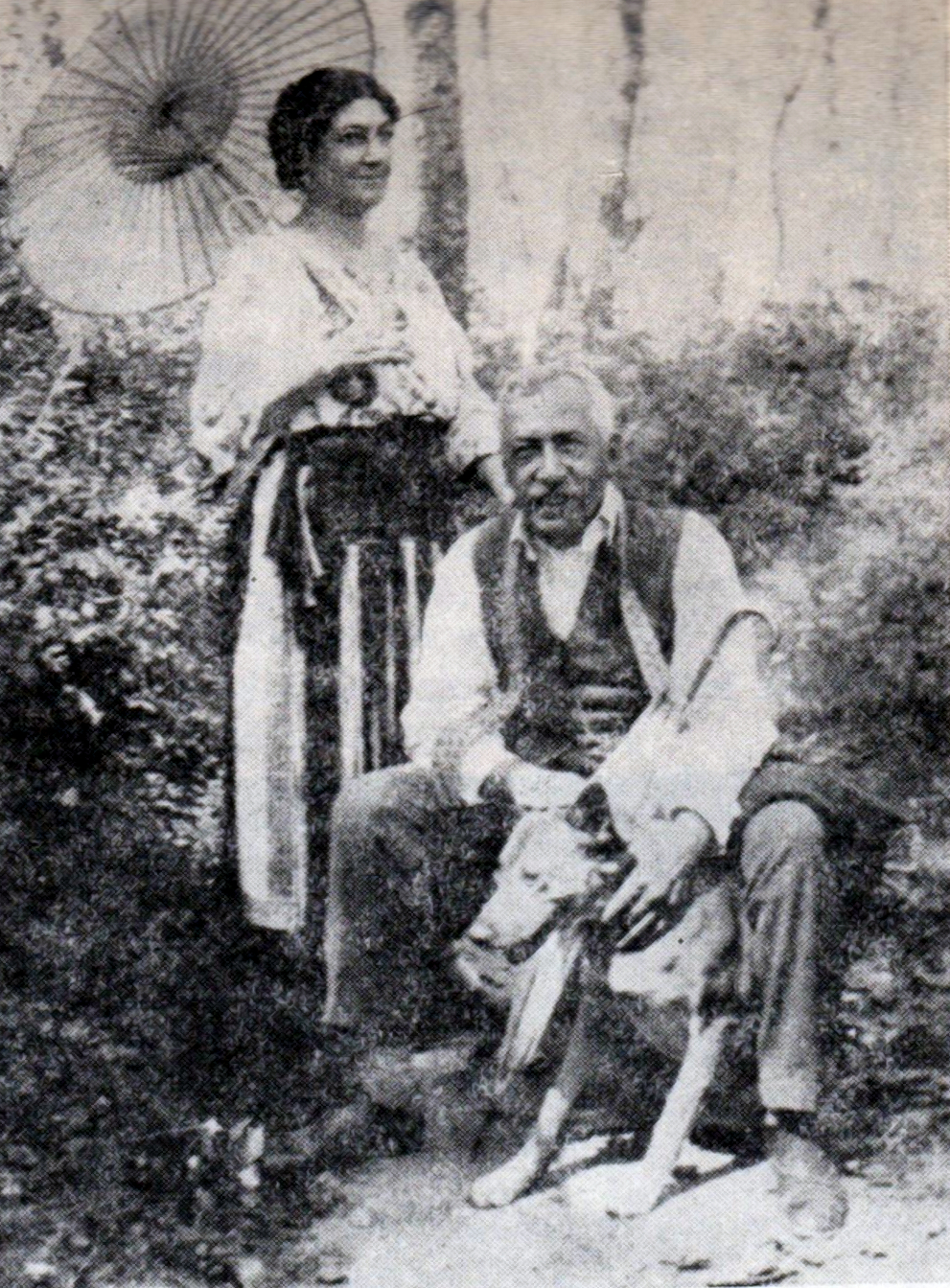 Gheorghe Petrașcu împreună cu soția